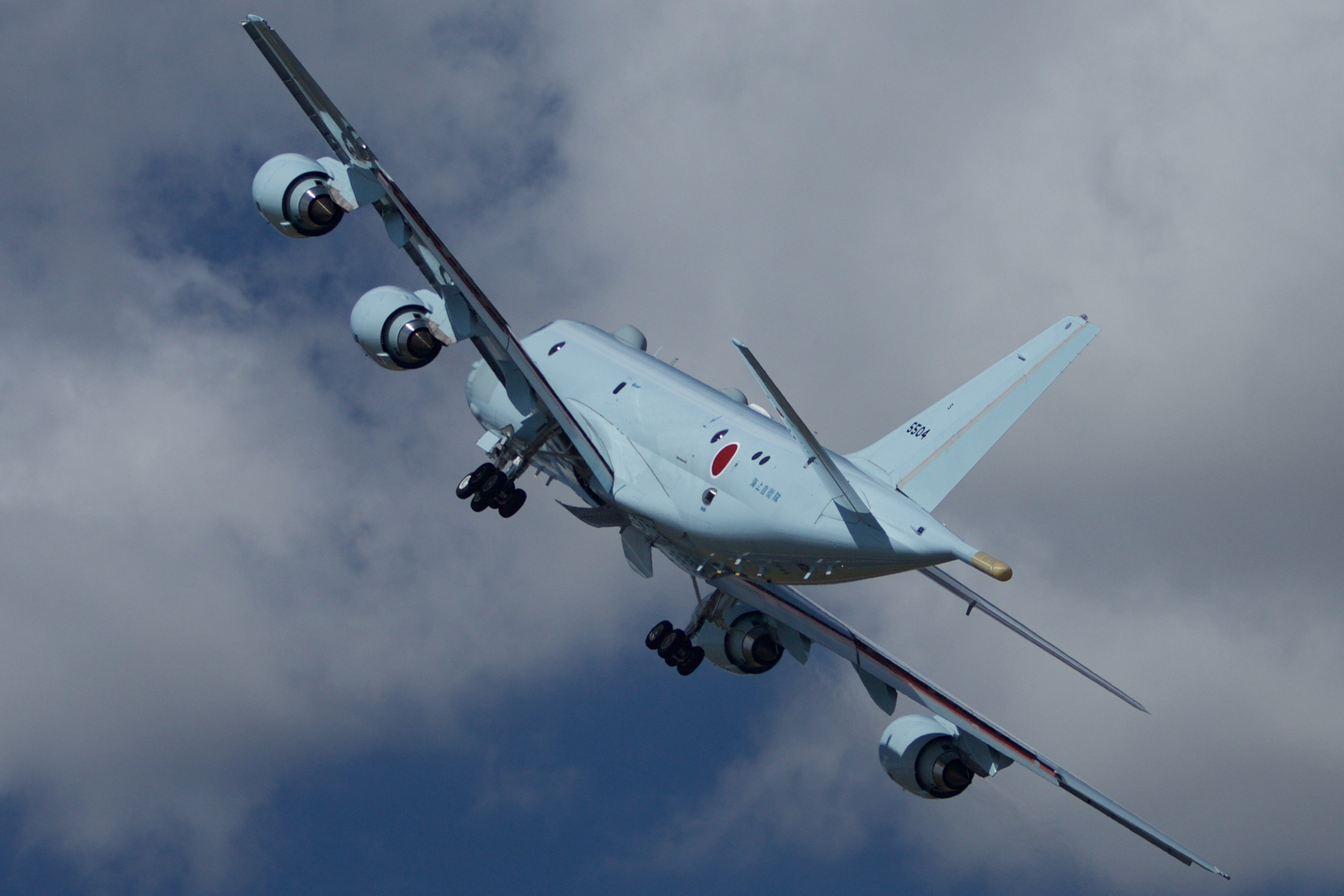 Kawasaki P-1